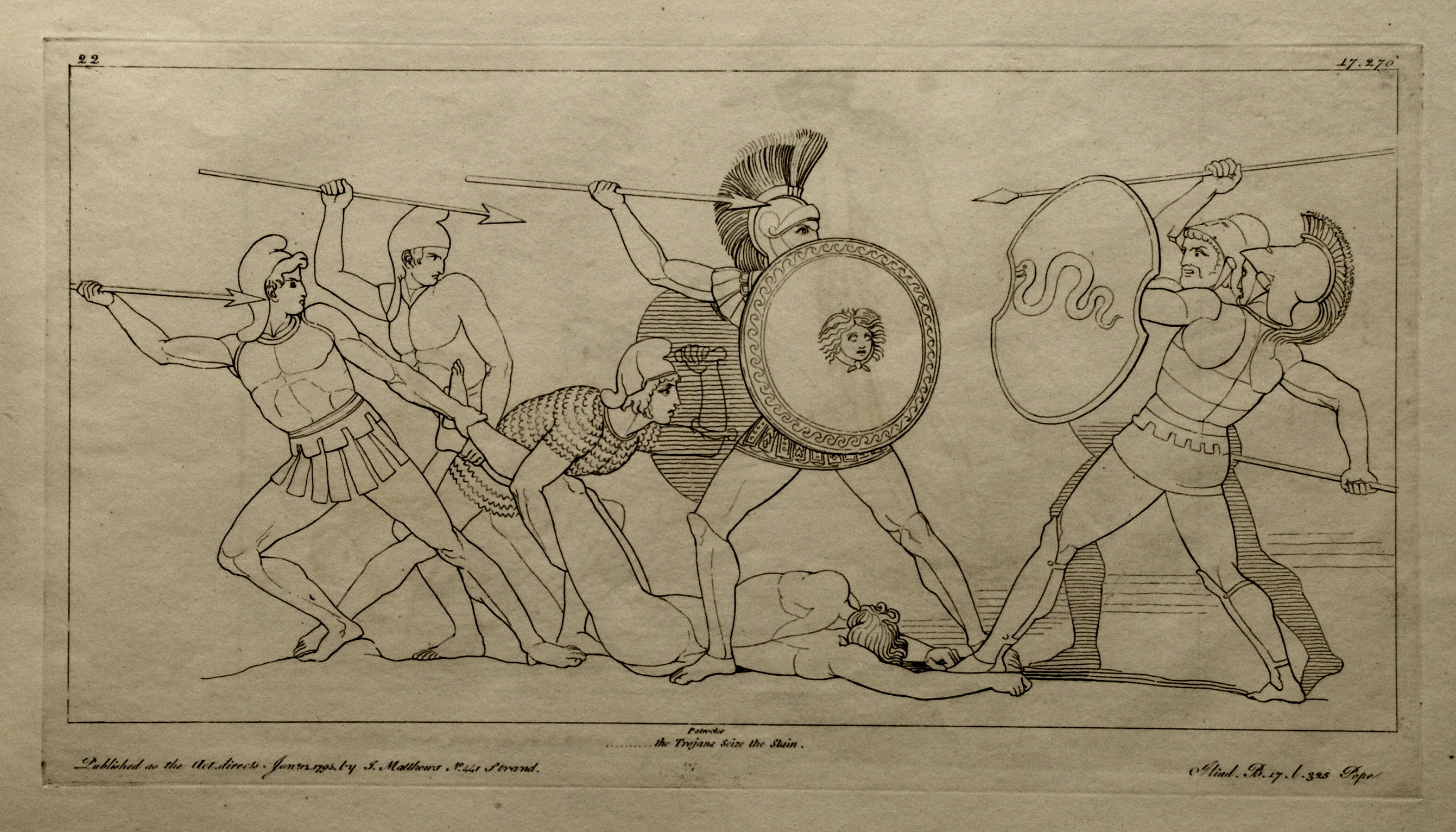 Kupferstich (1795) von Tommaso Piroli (1752 – 1824) nach einer Zeichnung (1793) von John Flaxman (1755 – 1826).